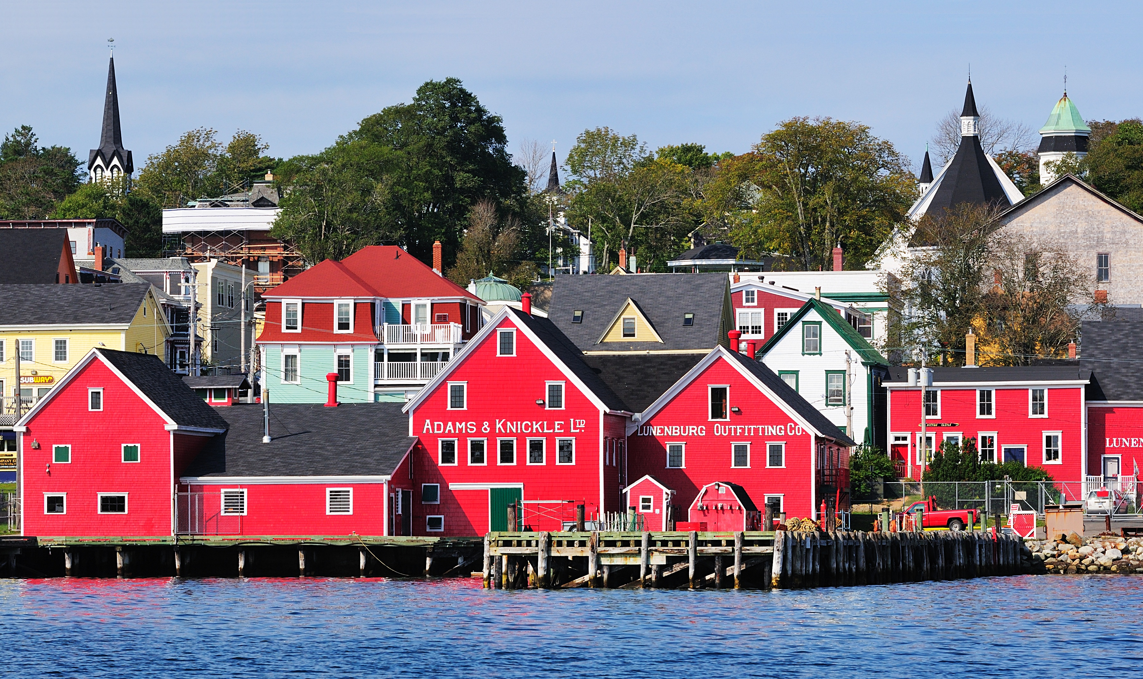 Lunenburg: Hafengebäude